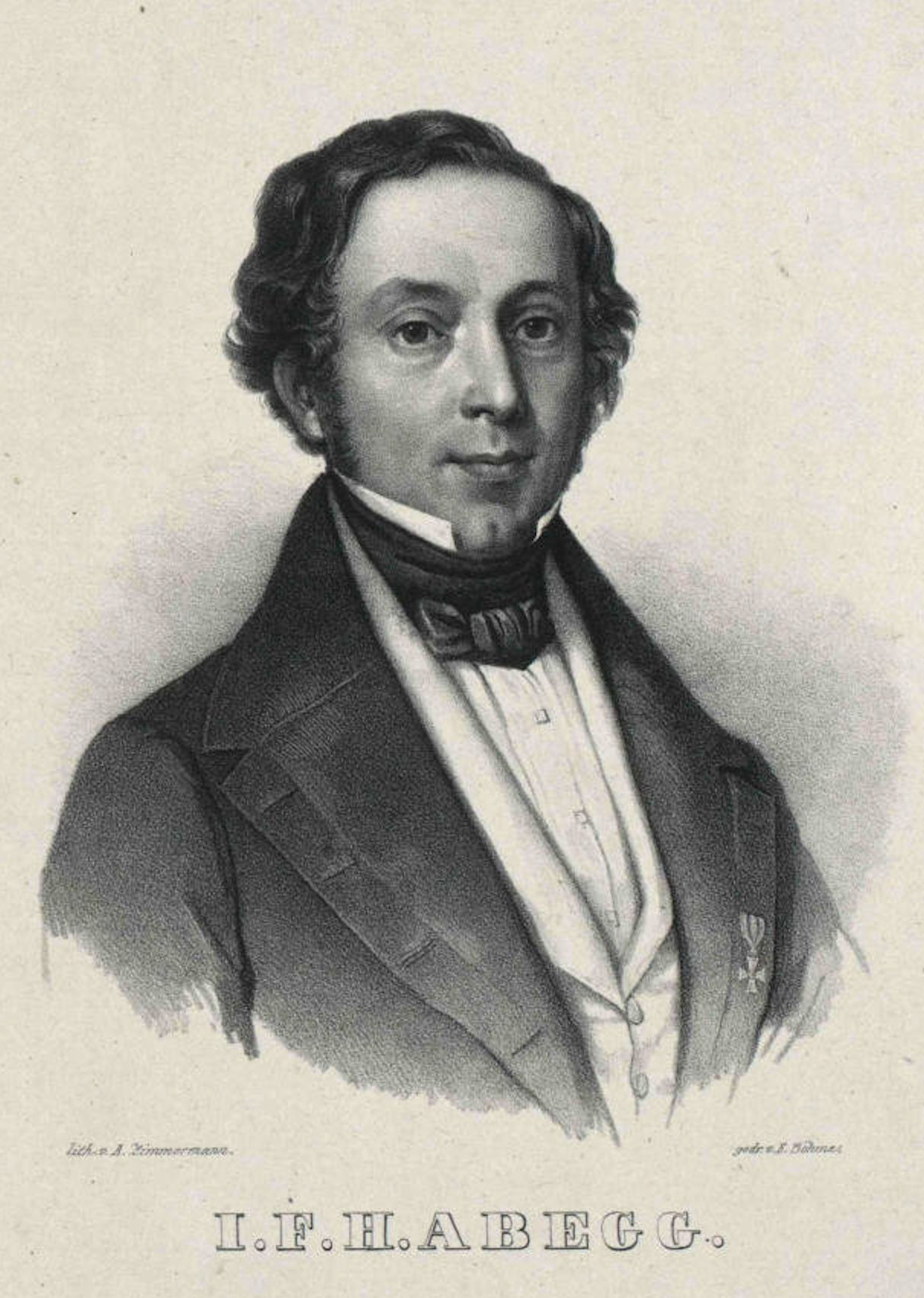 Porträtlithographie von Julius Abegg